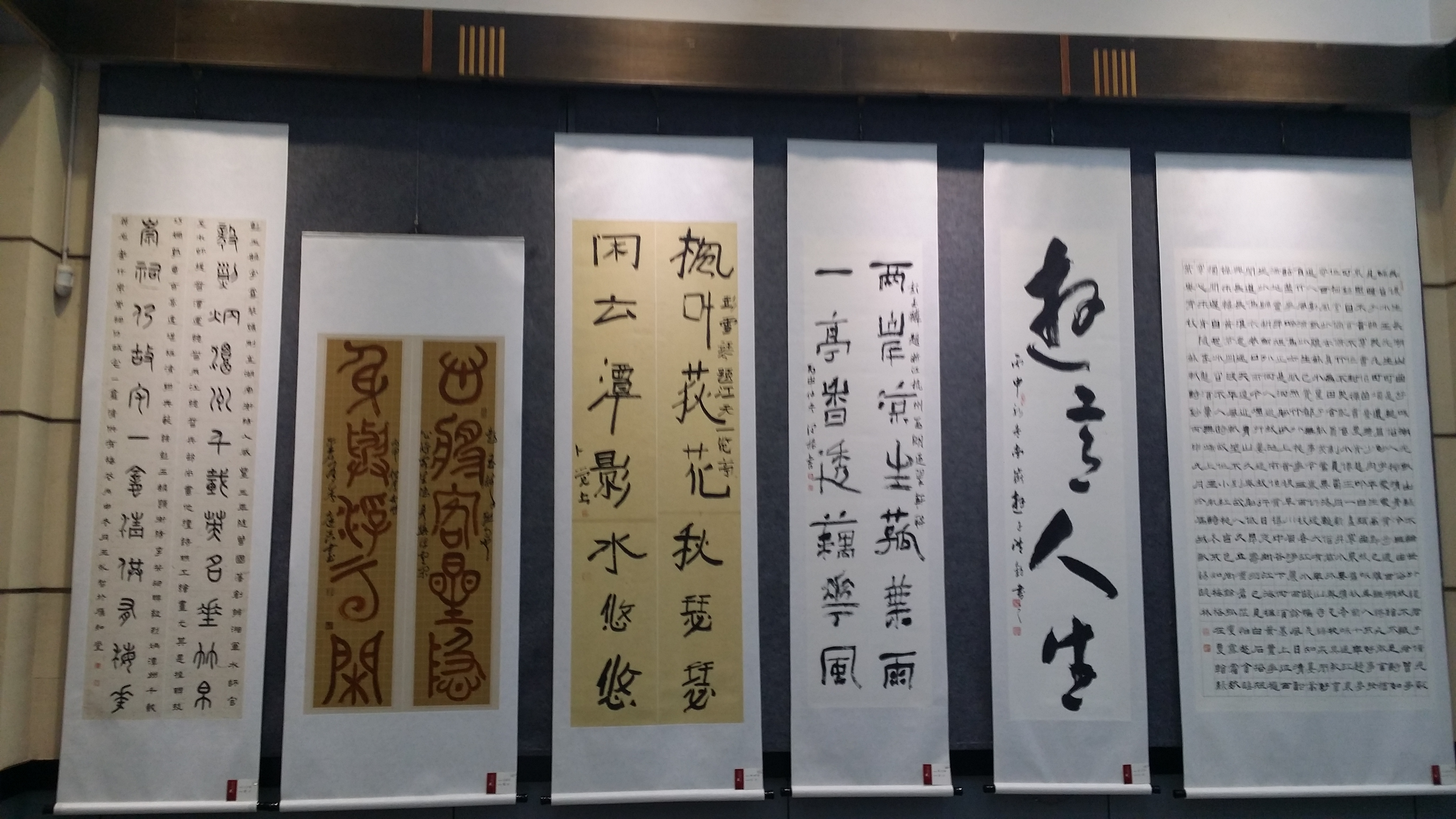 中文（中国大陆）: 衡阳市博物馆纪念彭玉麟诞辰200周年书画展，现代人作品